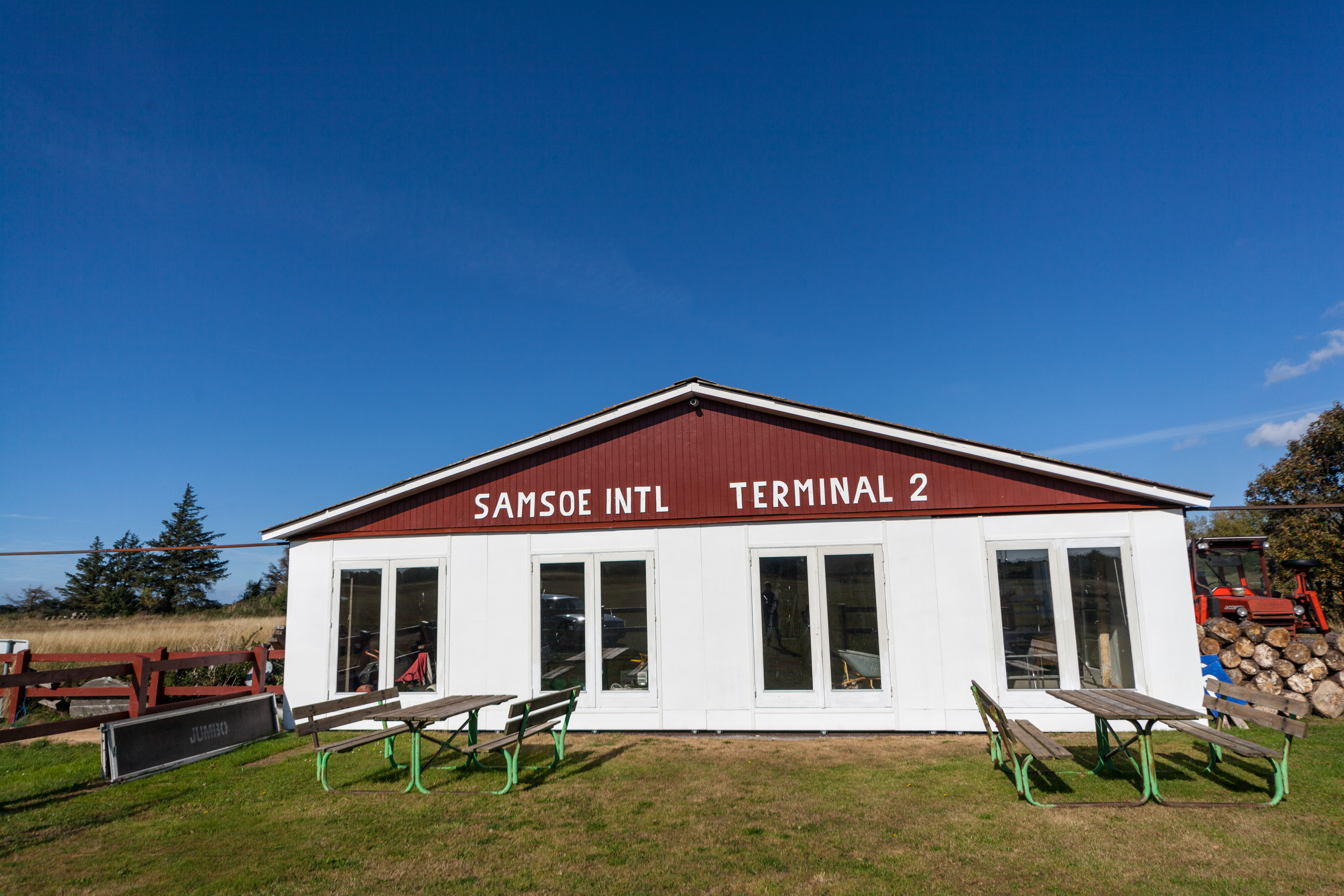 Samsø flyveplads